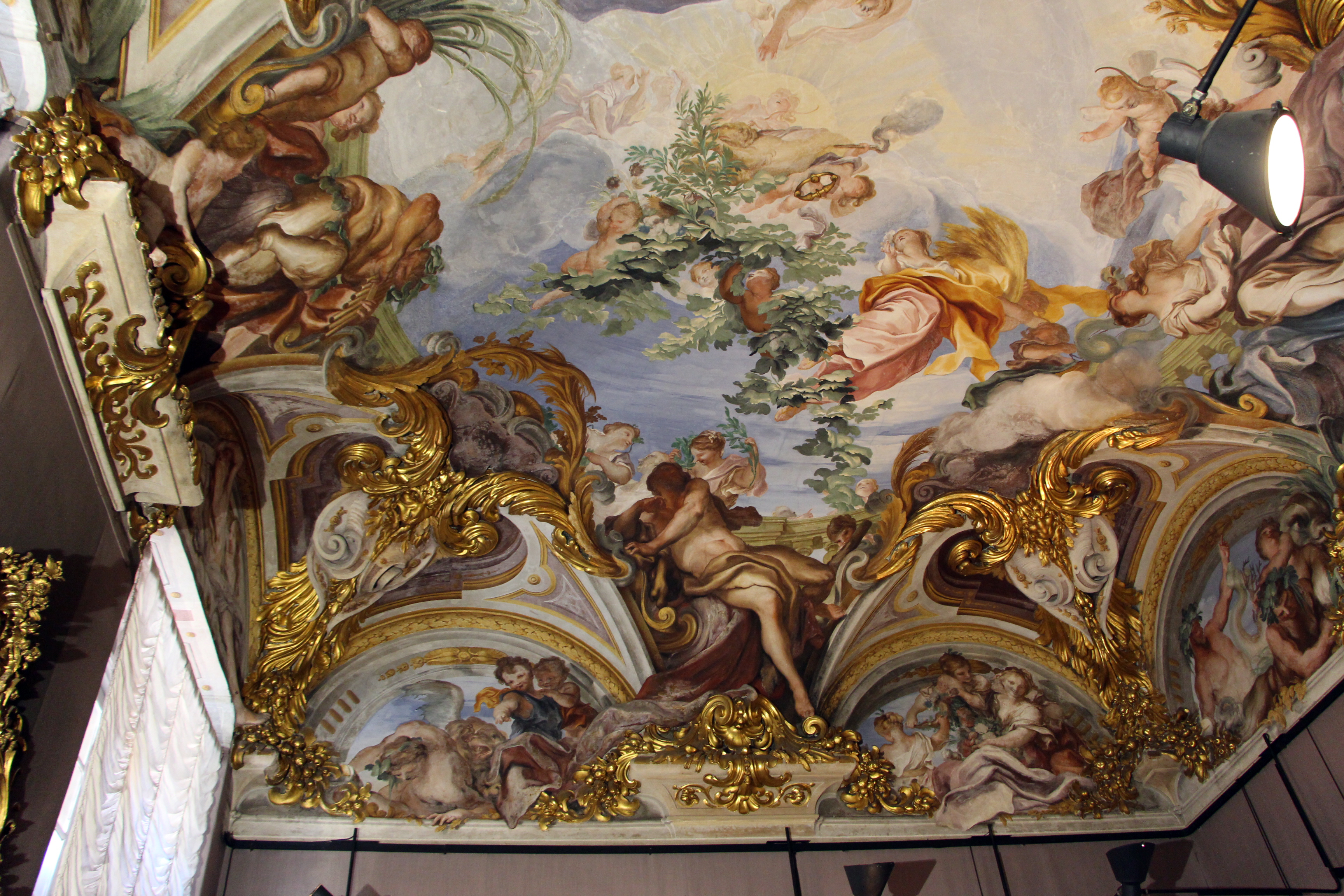 Palazzo Rosso - Musei di Strada Nuova The making of this document was supported by Wikimedia CH. (Submit your project!) For all the files concerned, please see the category Supported by Wikimedia CH. This is a photo of a monument which is part of cultural heritage of Italy.